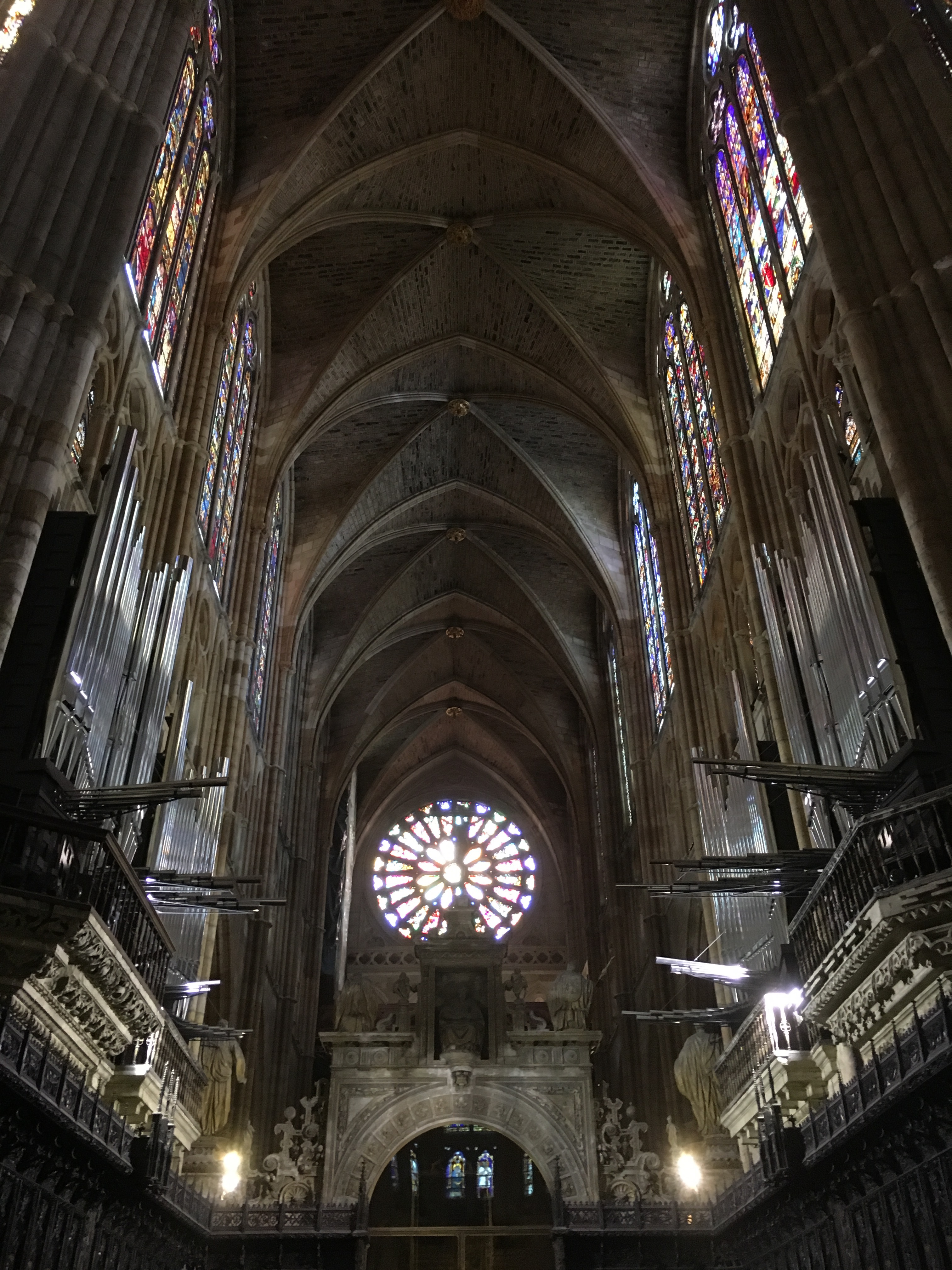 Coro de la catedral de León.